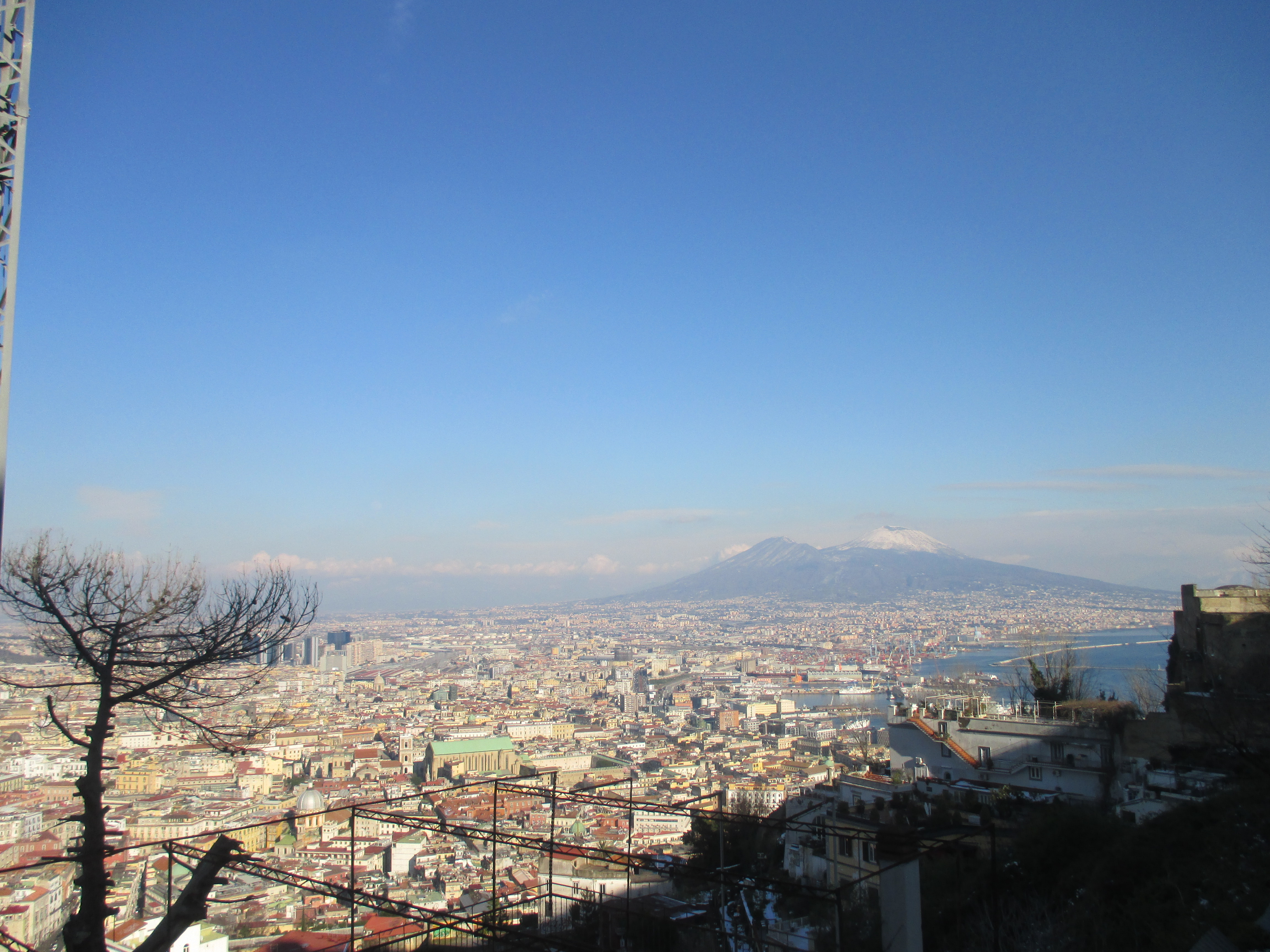 Вид на вулкан Везувий со смотровой площадки в Неаполе, Италия. Спасибо Just Go за путешествие